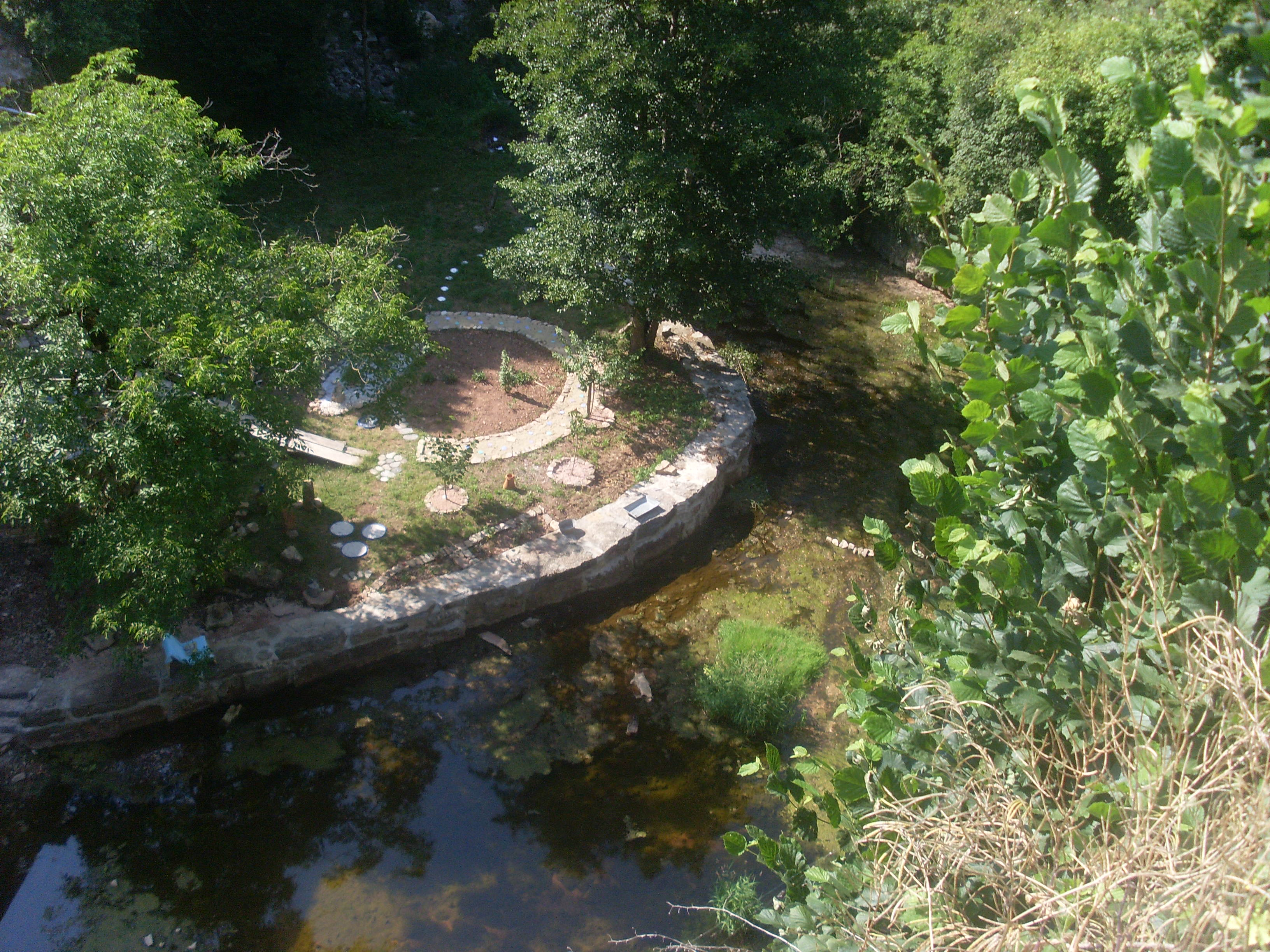 Le Dourdou au fond du trou de Bozouls